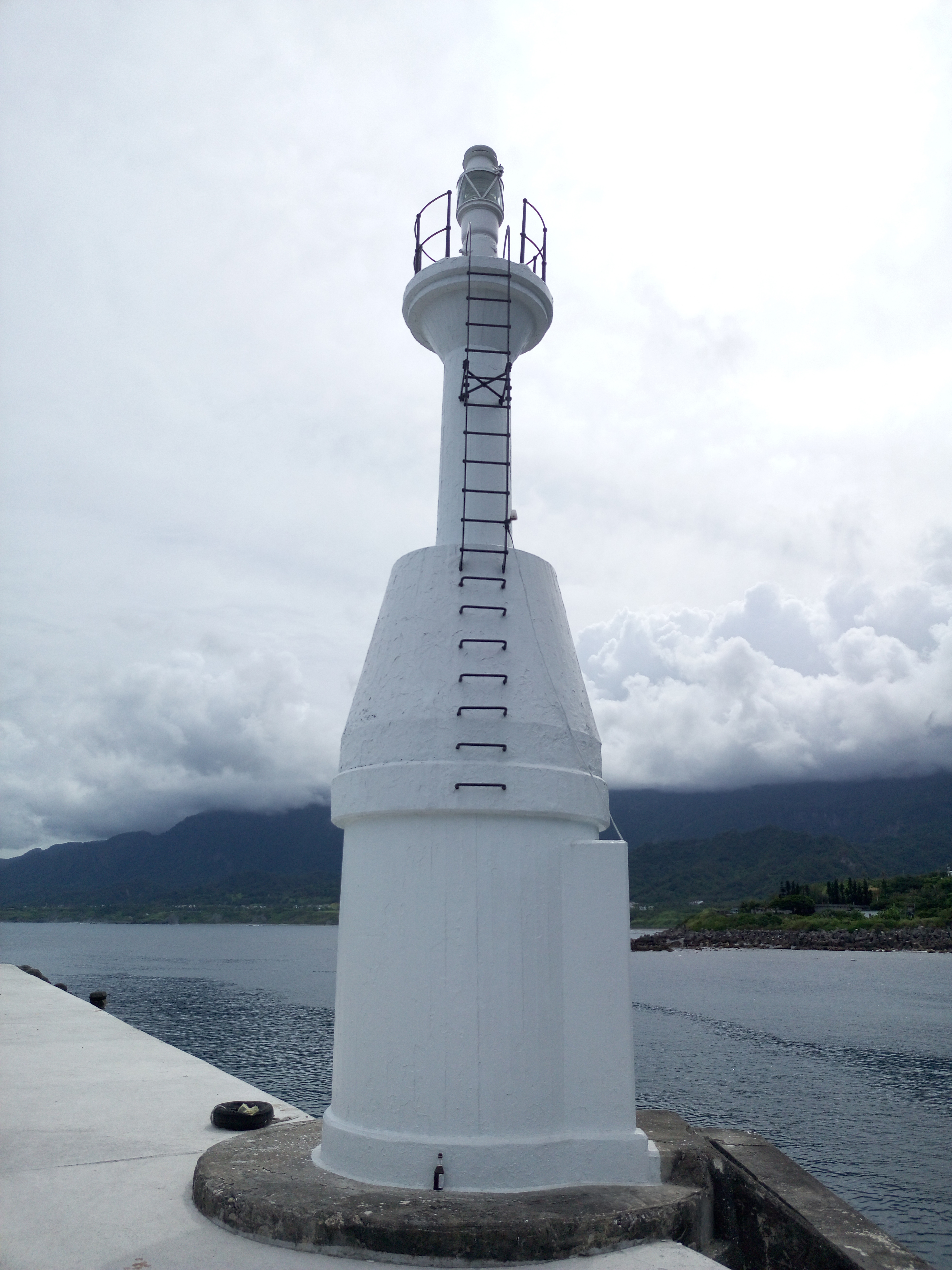 中文（台灣）: 臺灣臺東縣成功鎮成功漁港新港燈杆